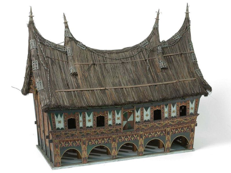 Huismodel. Model van een familiewoning Unknown language: Rumah gadang